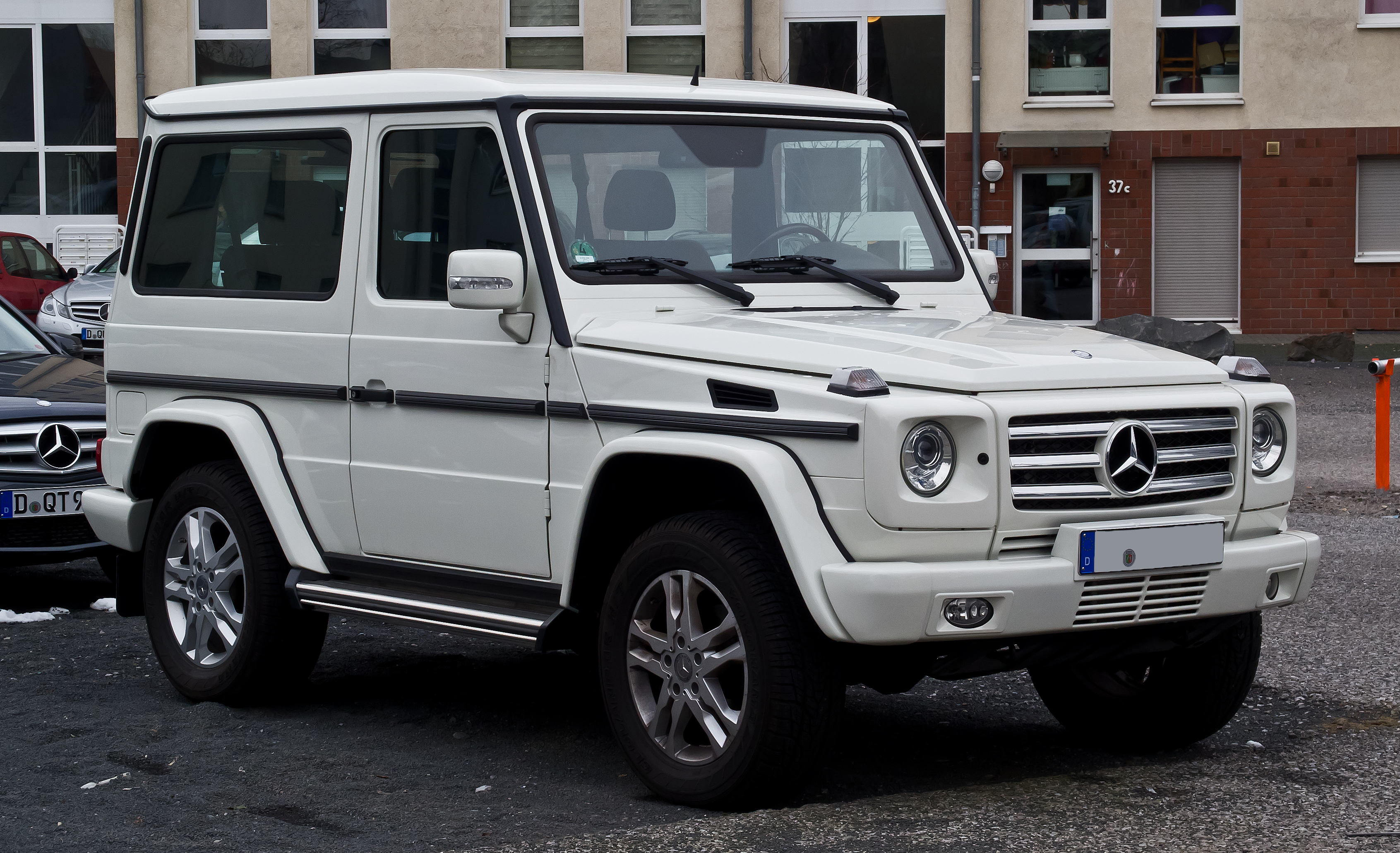 Mercedes-Benz G 350 BlueTEC (W 463, 2. Facelift)